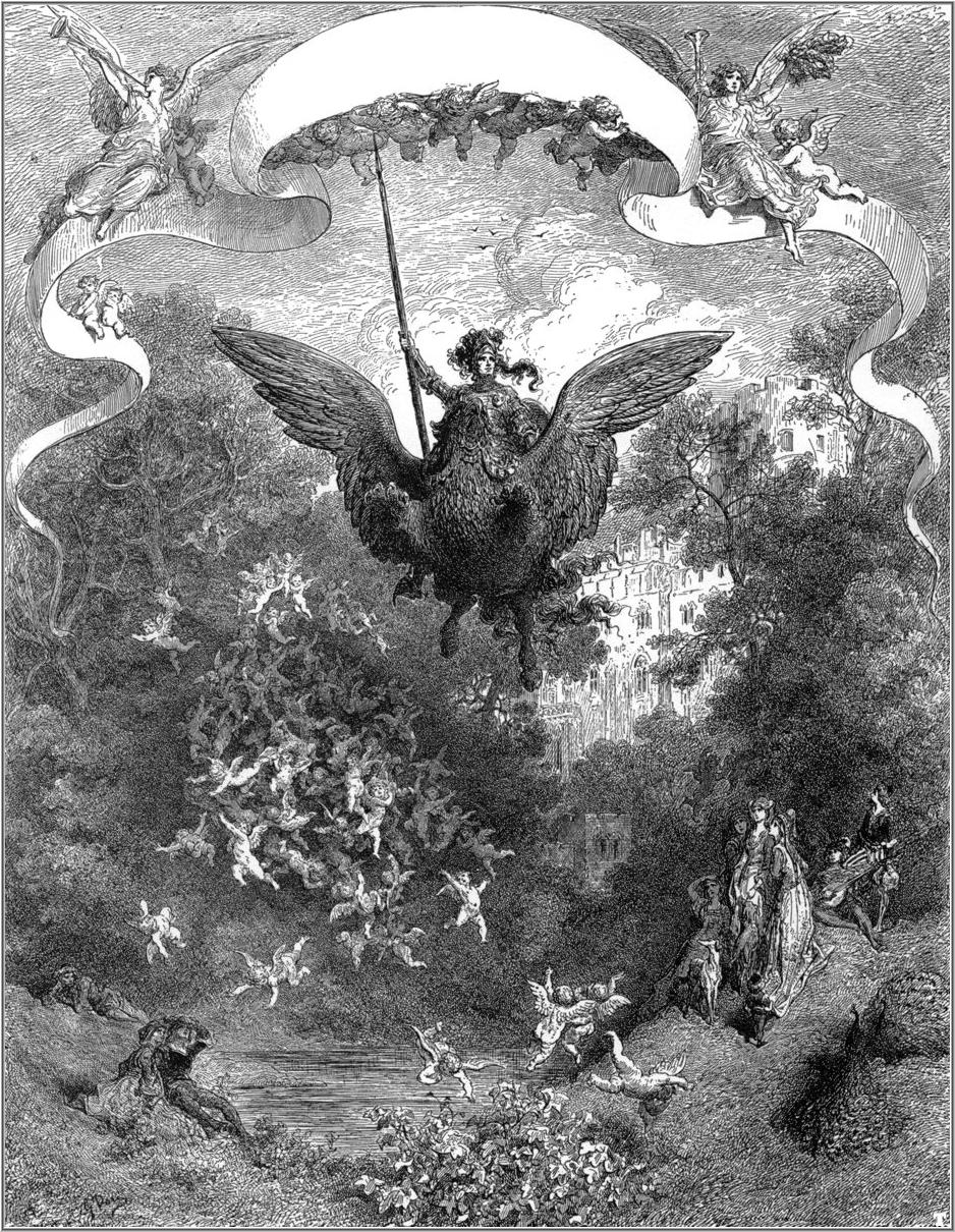 illustration of Ludovico Ariosto’s “Orlando Furioso”.